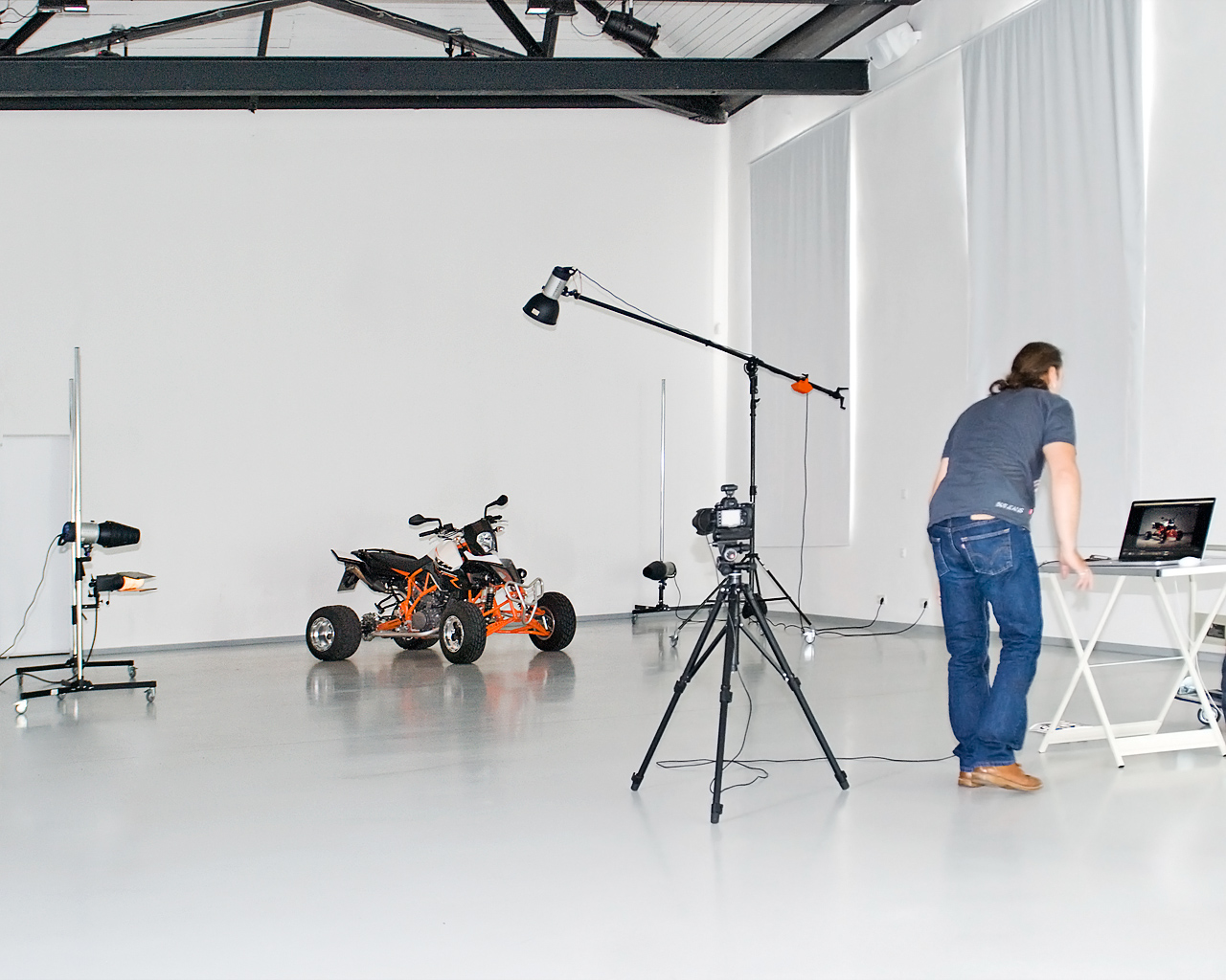 Überblick der Studioaufnahmen von